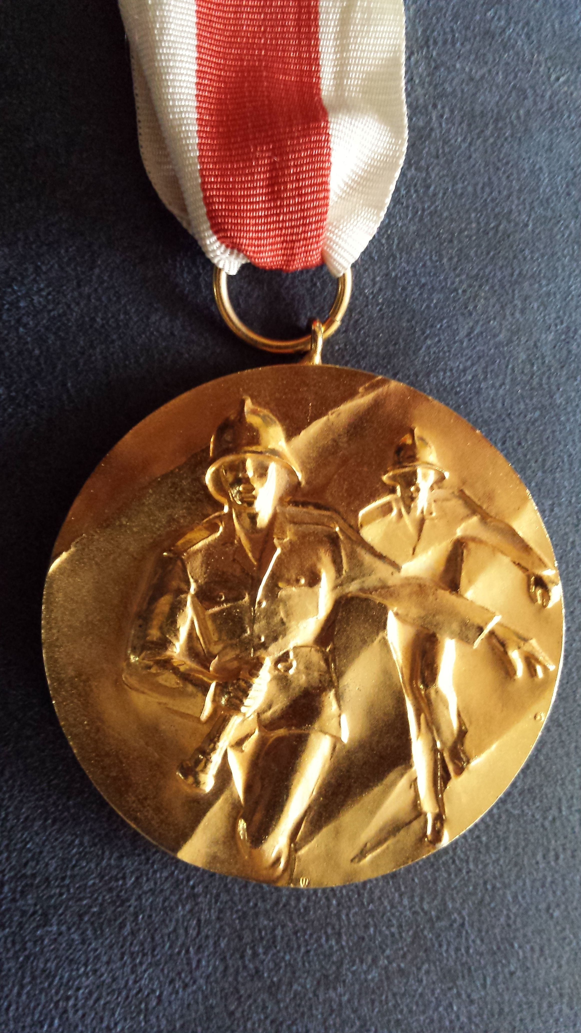 Internationale Feuerwehrsportwettkampfmedaille des CTIF 1989 - Vorderseite